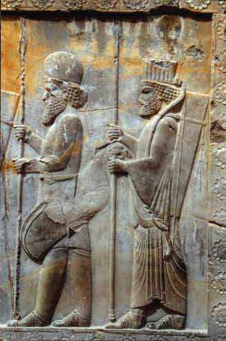 Achaemenid Soldiers in Persepolis